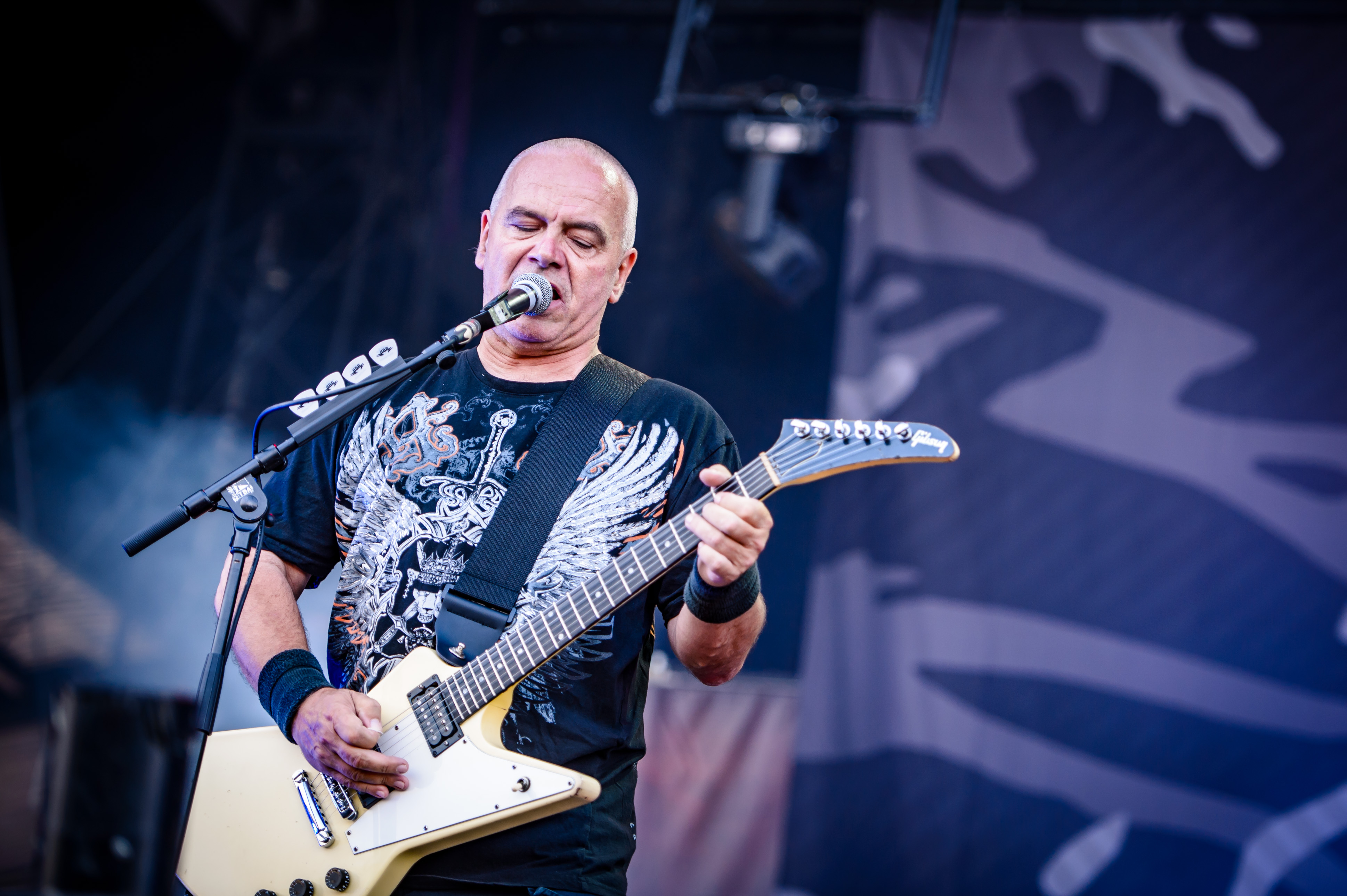 'Summer Breeze Festival 2018; Dinkelsbühl': 'Dirkschneider'